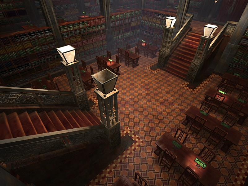 Capture d'écran du jeu vidéo Syberia (2002), développé et édité par Microïds. Vue de la bibliothèque de l'université à Barrockstadt, deuxième ville explorée par l'héroïne Kate Walker durant son aventure.